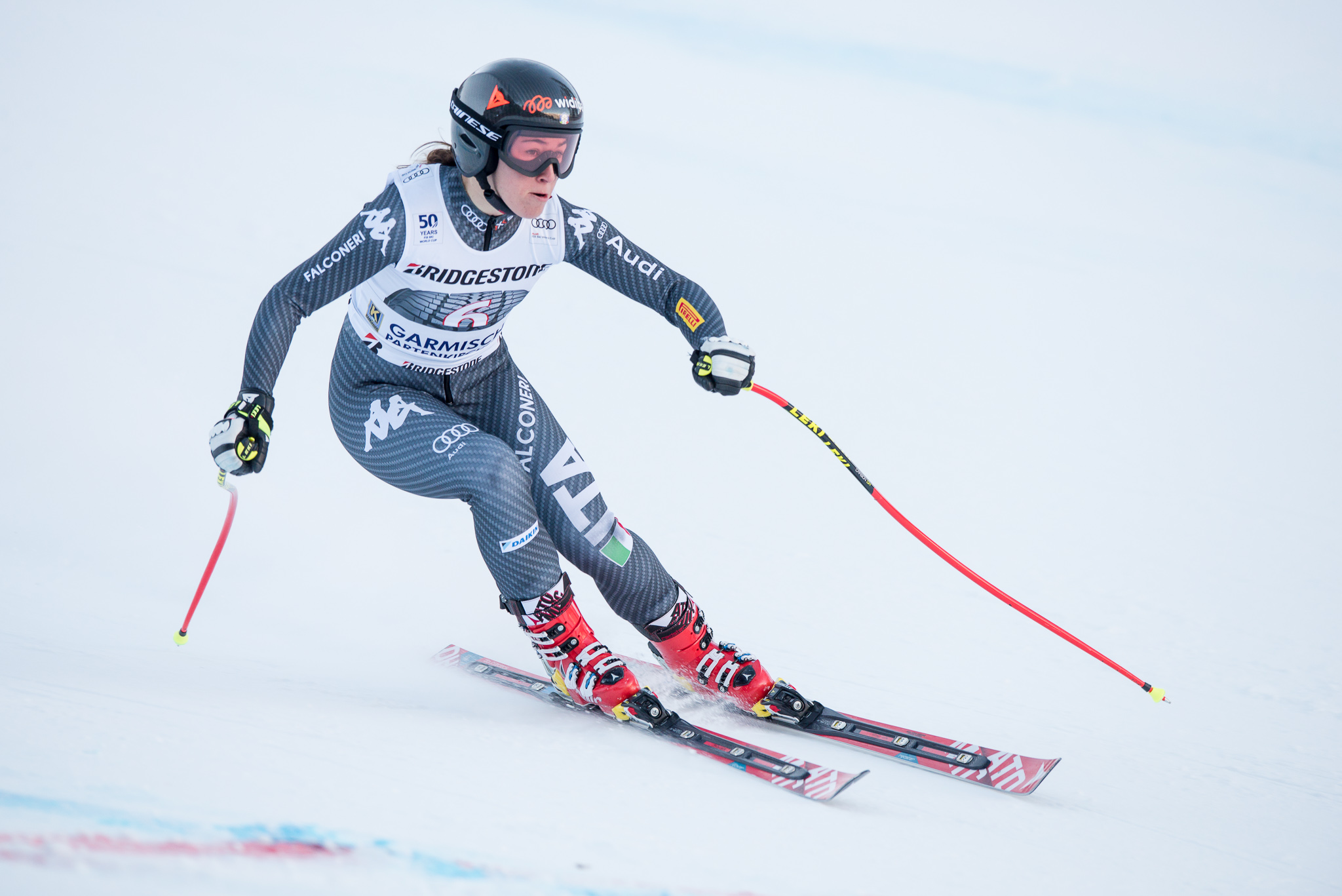 64. Kandahar Rennen,Audi FIS Ski Weltcup Garmisch-Partenkirchen,Damen Abfahrt,Kandahar,Ladies Downhill,Sofia Goggia